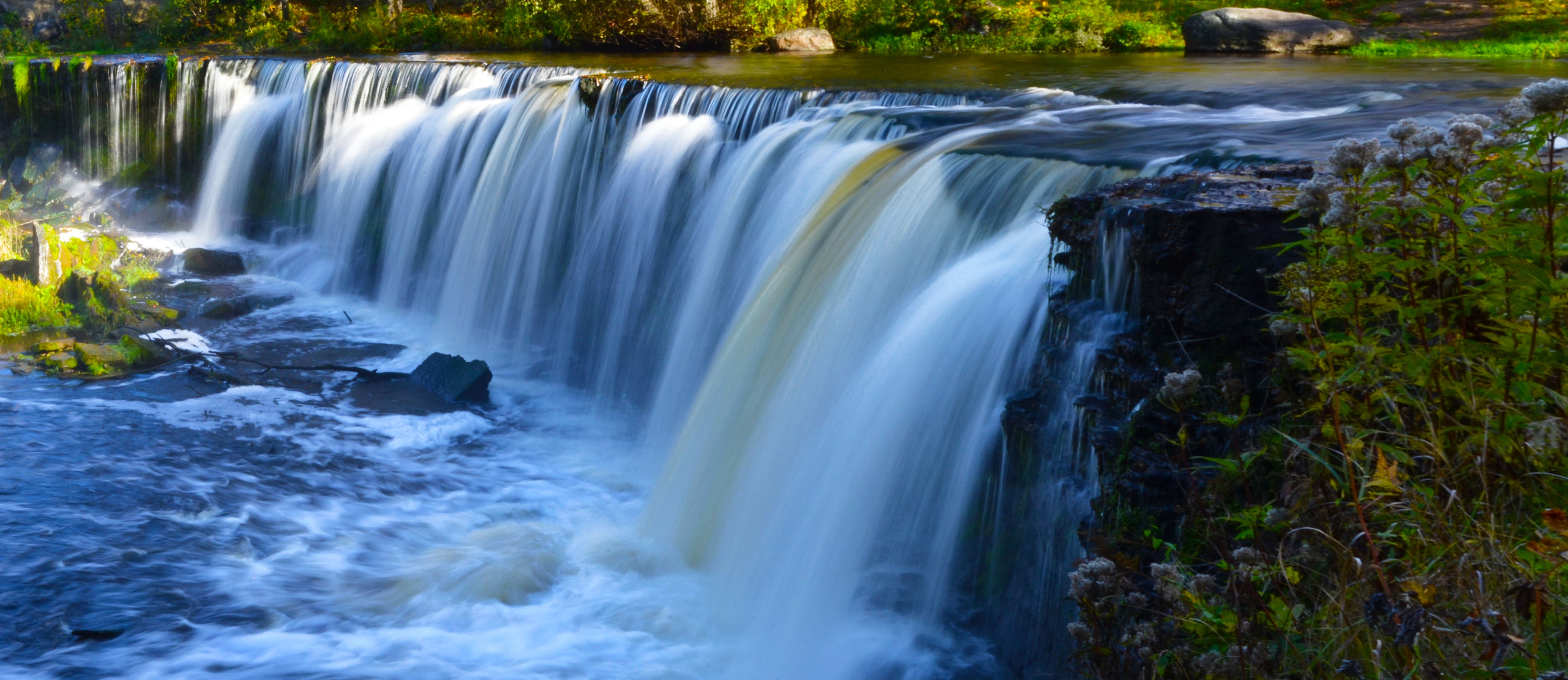 Keila juga 2016. aasta sügisel.